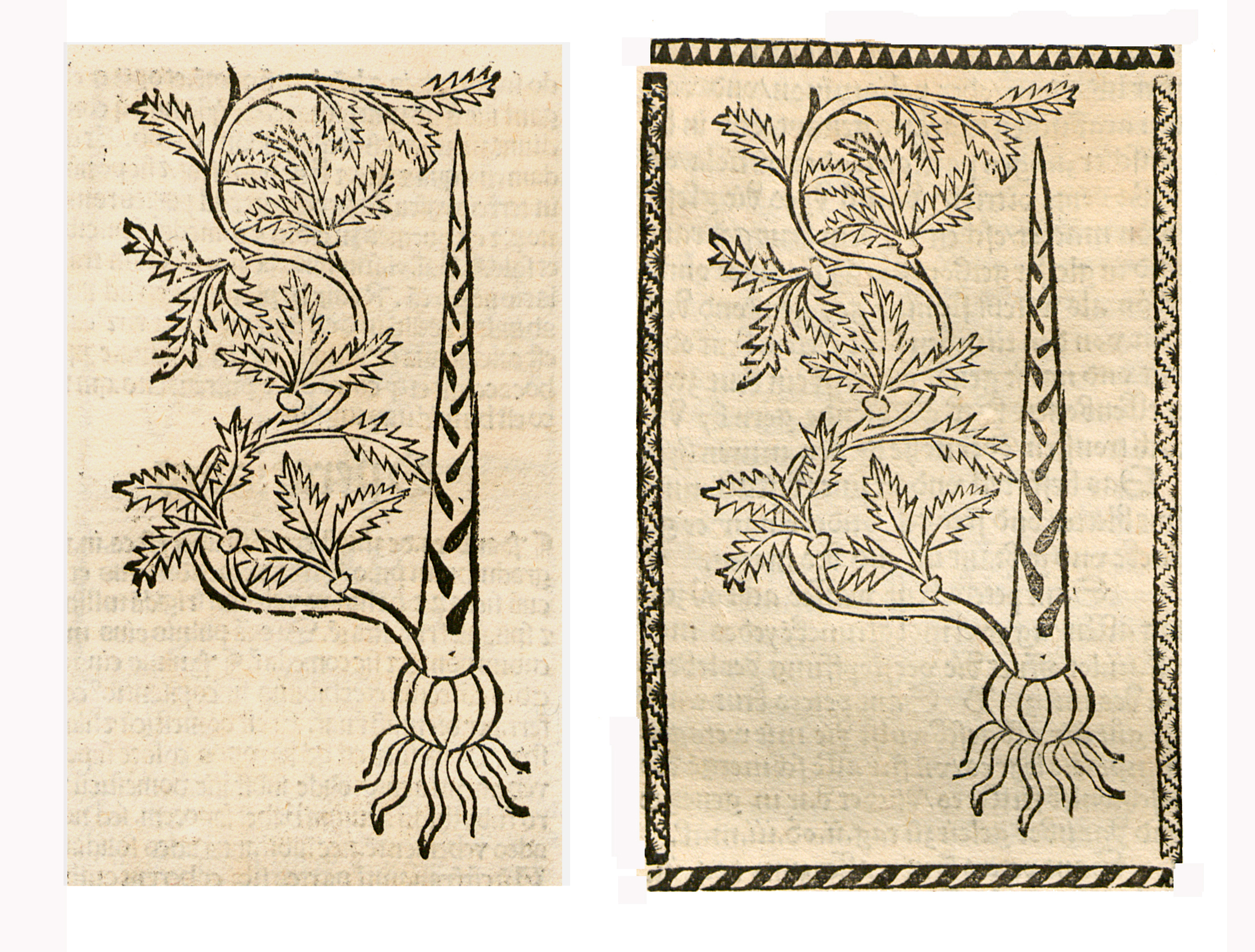 Abbildung vonː Spargen (Asparagus officinalis)